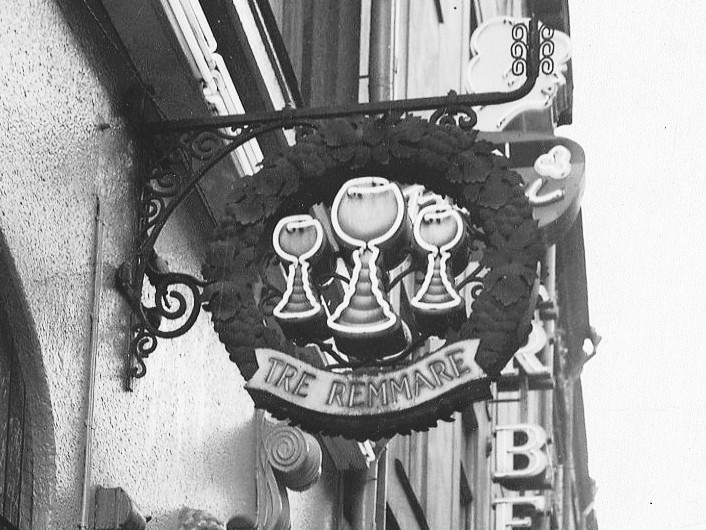 Tre Remmares flaggskylt, Regeringsgatan 16